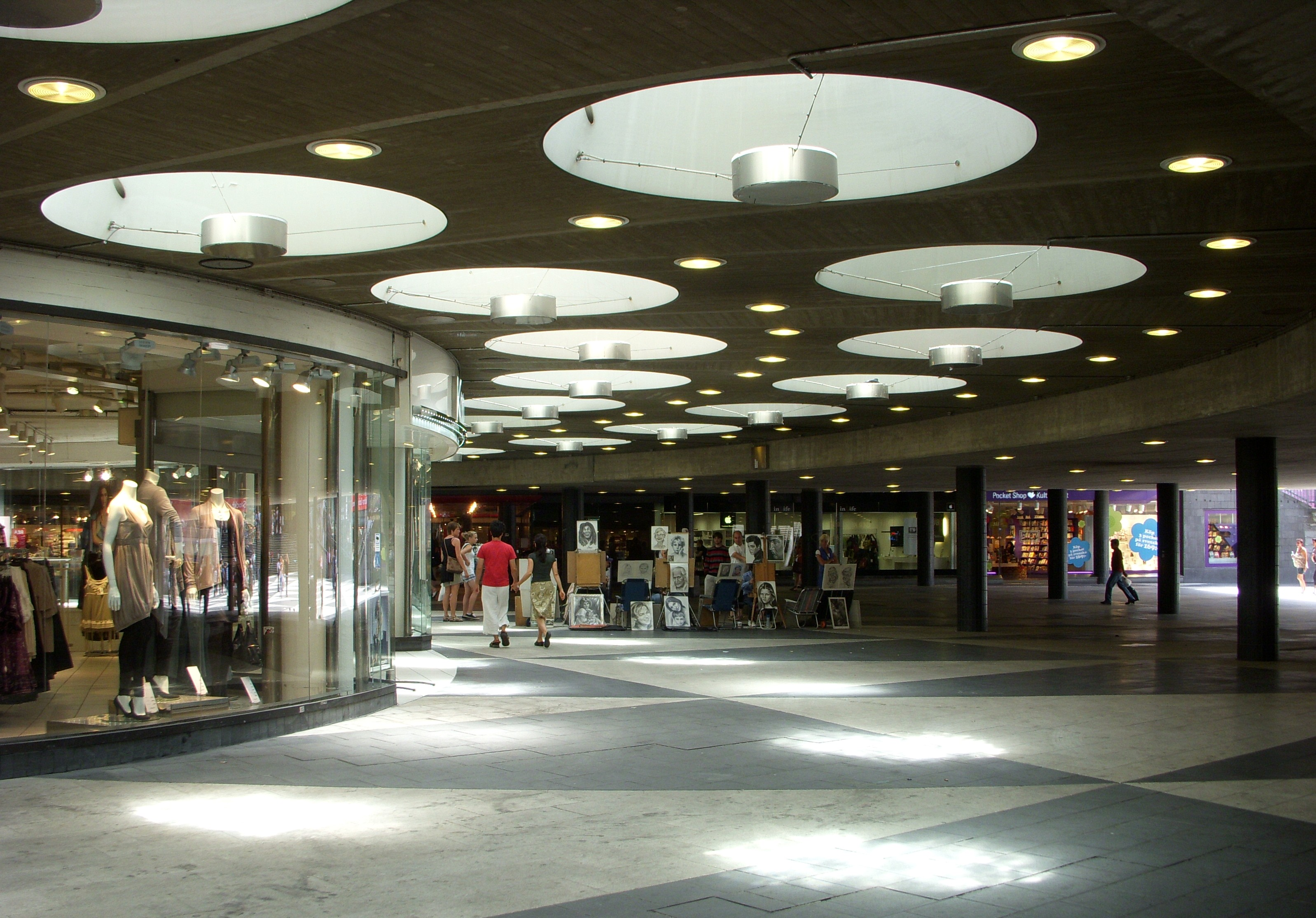 Sergels torg i Stockholm, undre plan